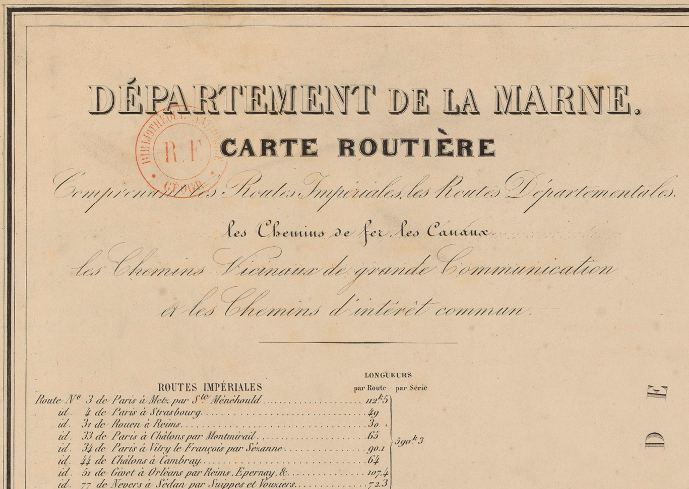 Carte routière comprenant les Routes Impériales, les Routes Départementales, les Chemins de fer, les Canaux, les Chemins vicinaux de grande Communication et les chemins d'intérêt commun. Département de la Marne / A. Jacquart del. ; Ch. Gobert sculp. Éditeur: Chardon imp. (Paris)